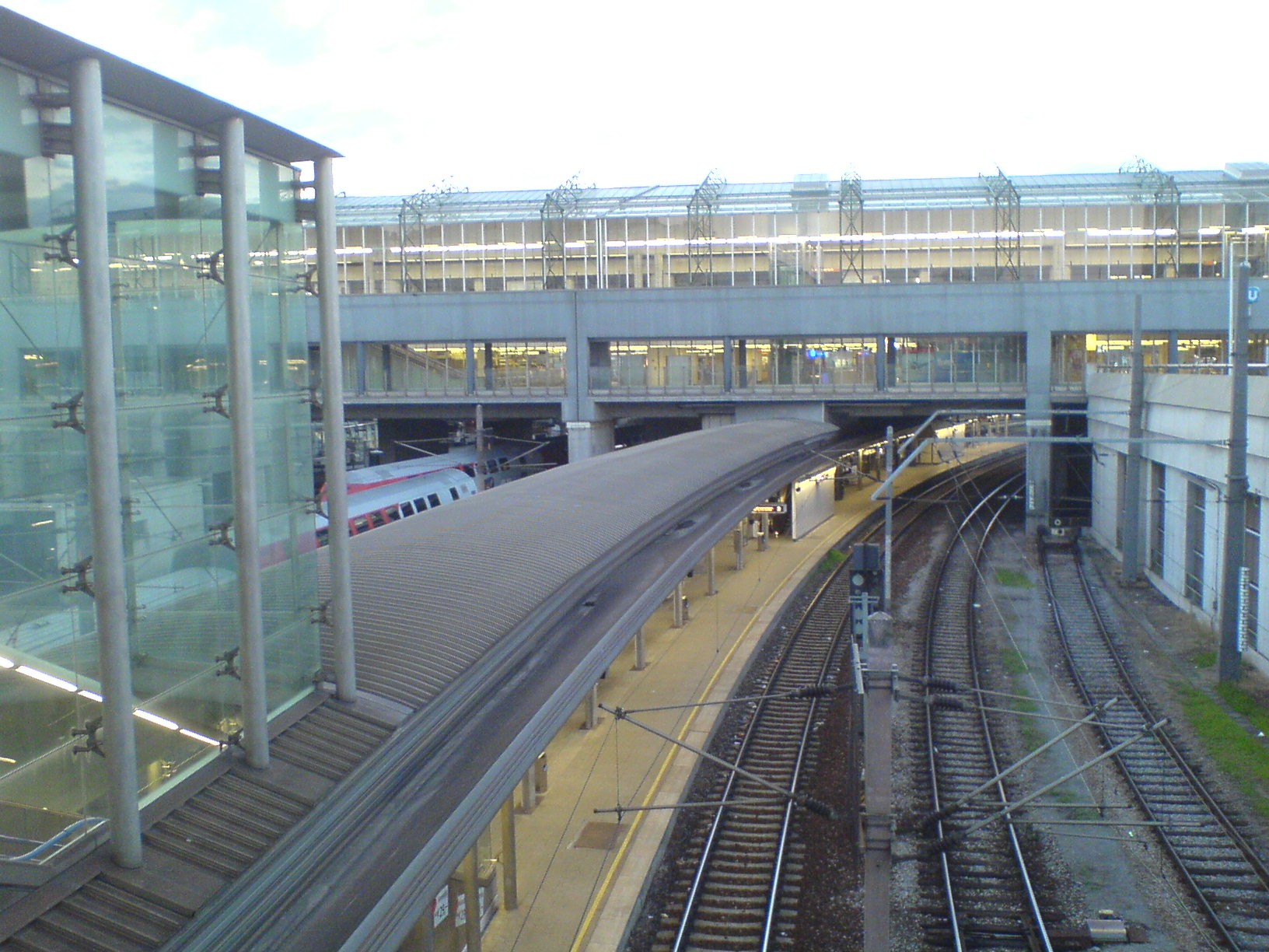 S-Bahnsteige des Nahverkehrsknotens Spittelau in Wien